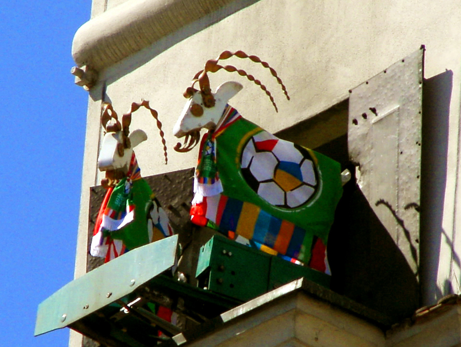 Koziołki ubrane we flagi z okazji EURO 2012